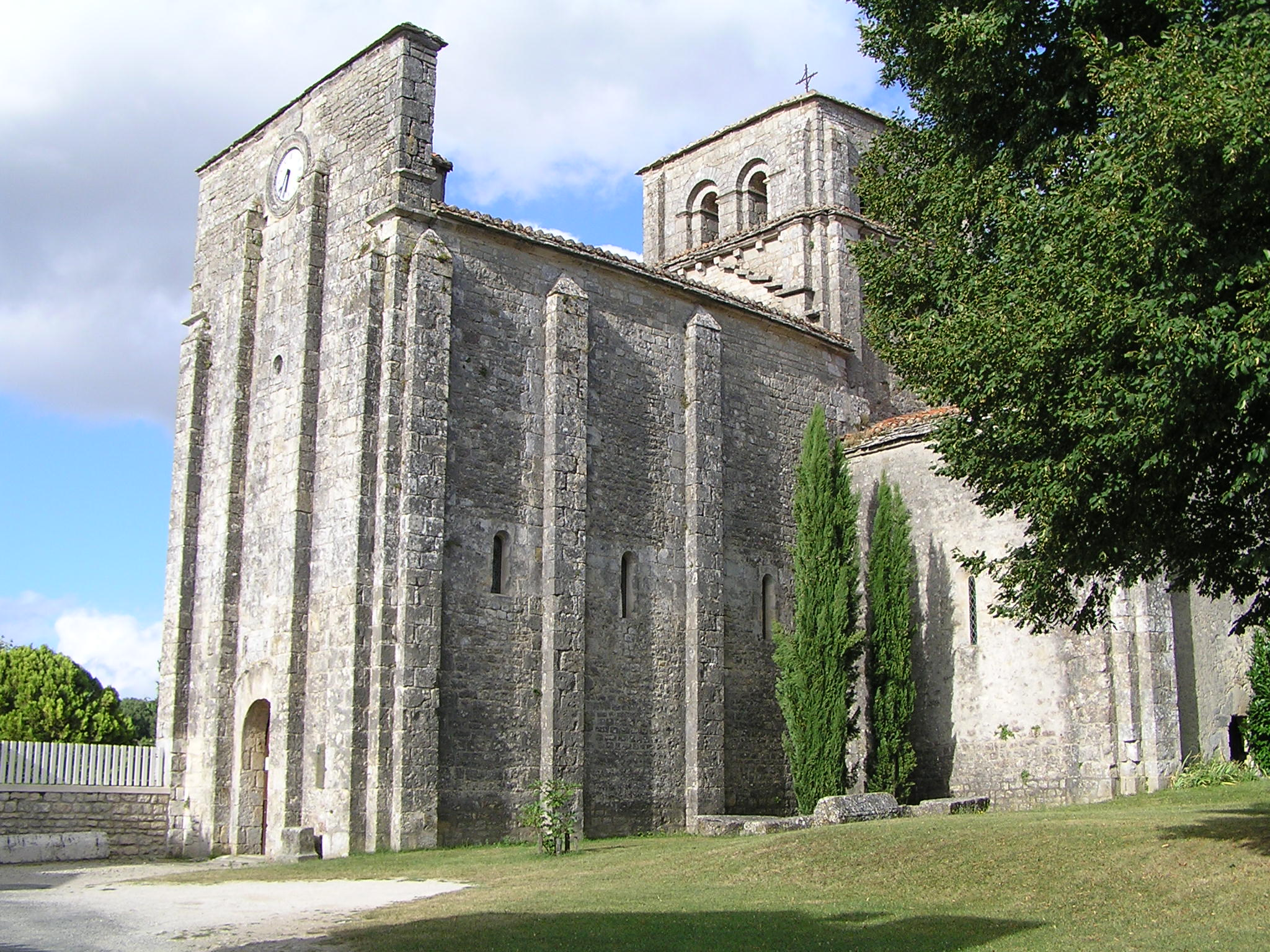 église de Nanclars, Charente, France